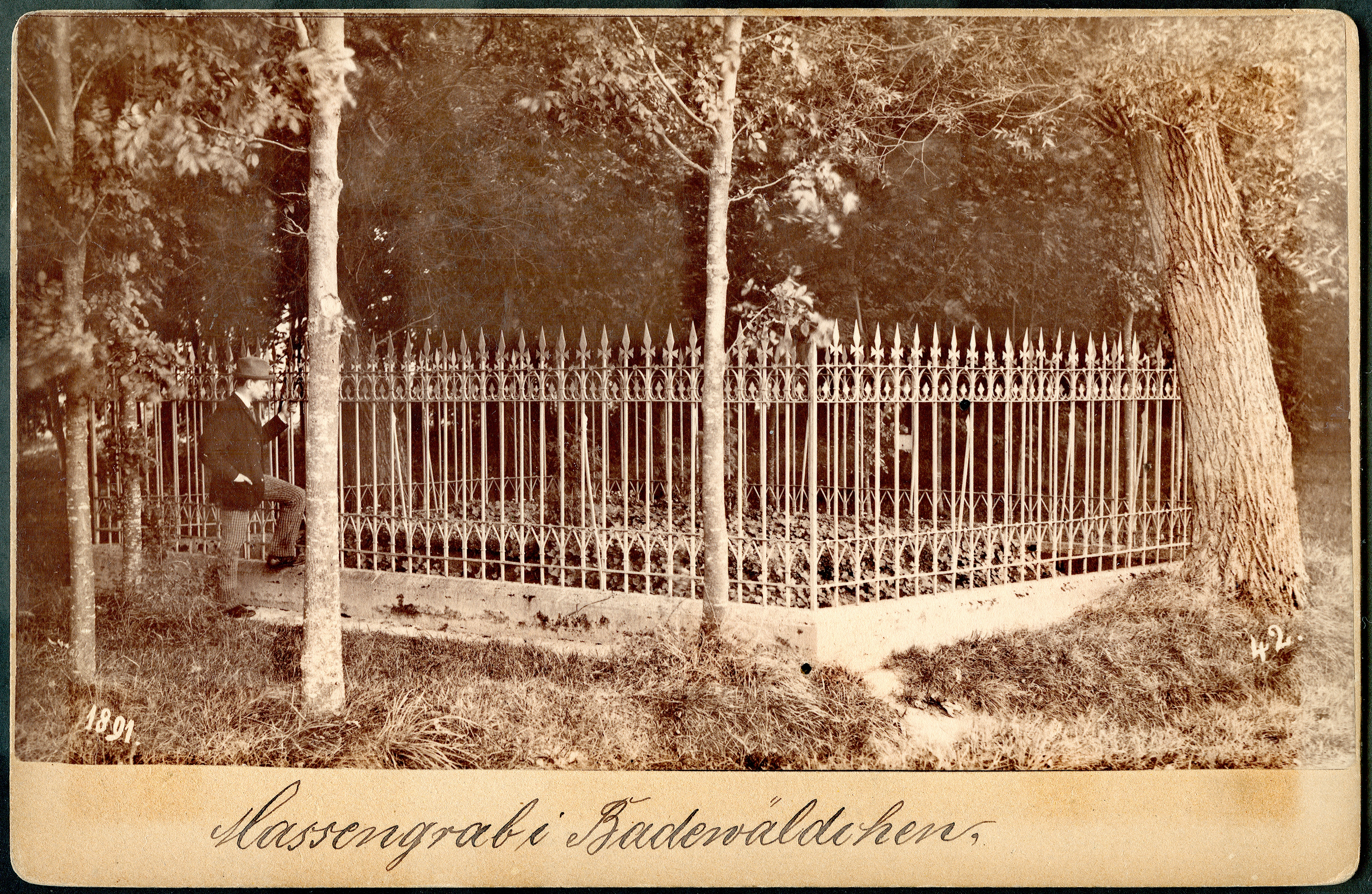 Handschriftlich auf dem Negativ mit der Jahreszahlt 1891 sowie der Nummer 42 nummerierte Aufnahme des Fotografen Christian Gottfried Bregazzi im Kabinettformat mit einem Blick auf das „Massengrab i Badewäldchen“ , das nach der Schlacht bei Langensalza angelegt wurde. Der Fotograf war erfahren genug, eine Begleitperson in das Foto zu intergrieren, um die Größe des Grabes zu verdeutlichen ...